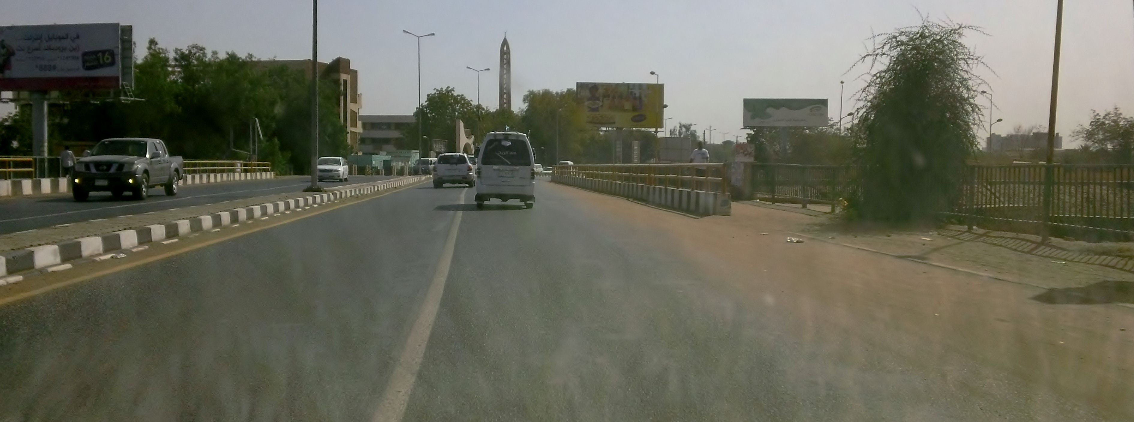 شارع المردة – أم درمان – السودان